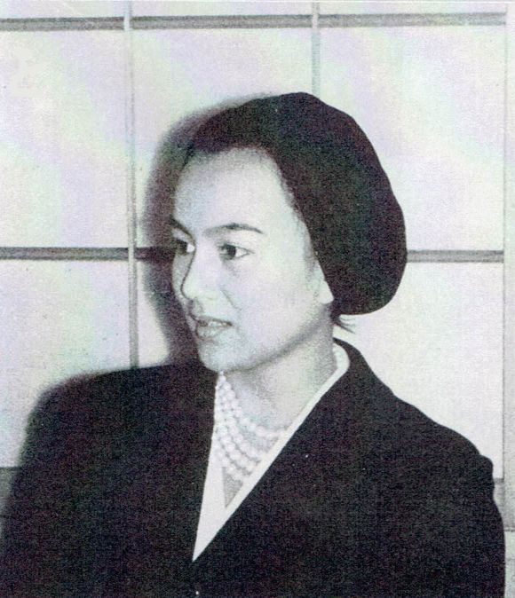 プリンス自動車販売『プリンス』第9巻第5号（1962）より兼高かおる